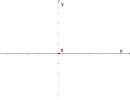 Ejes cartesianos.